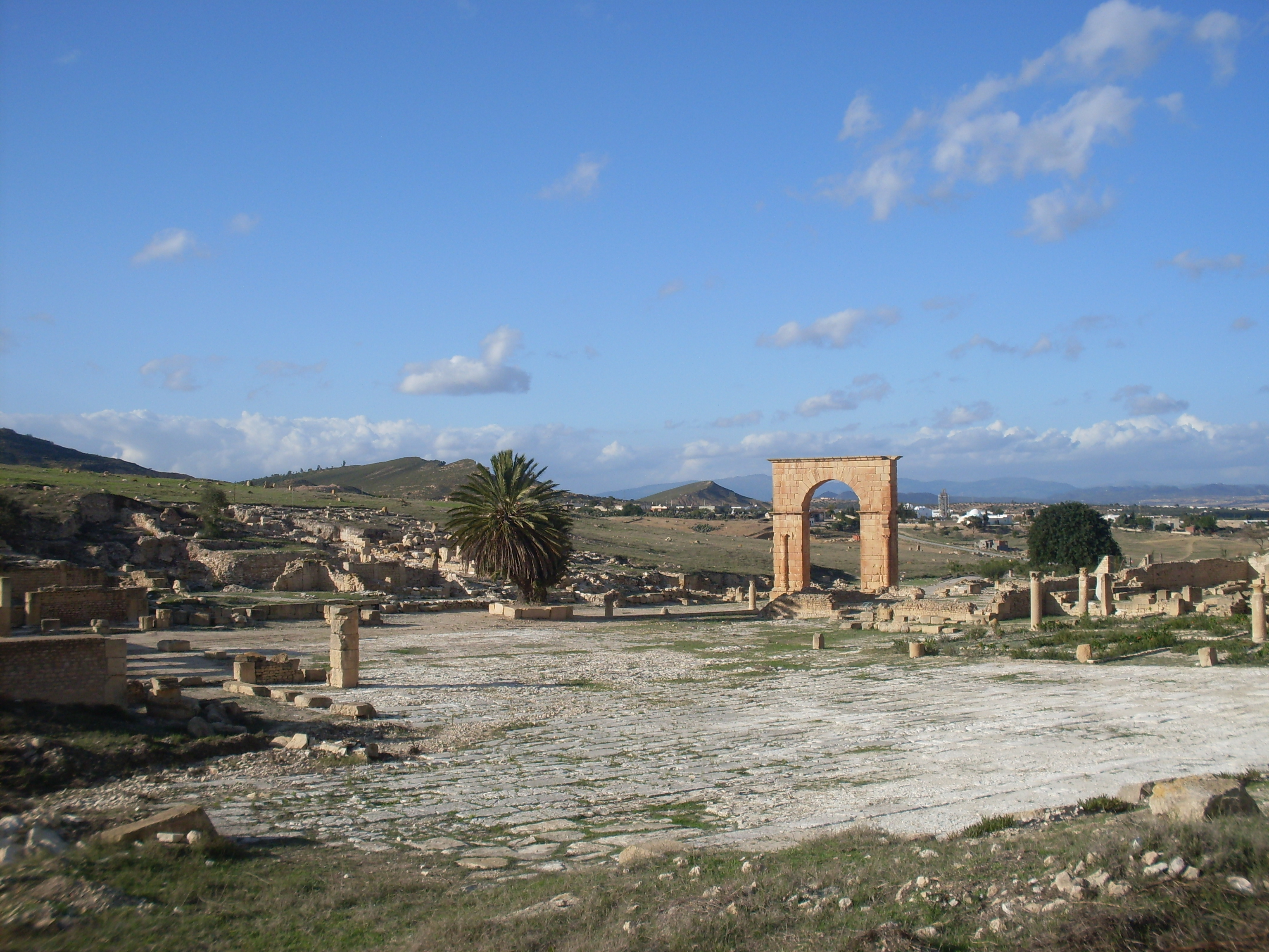 Tunisie, Pheradi majus, grande place